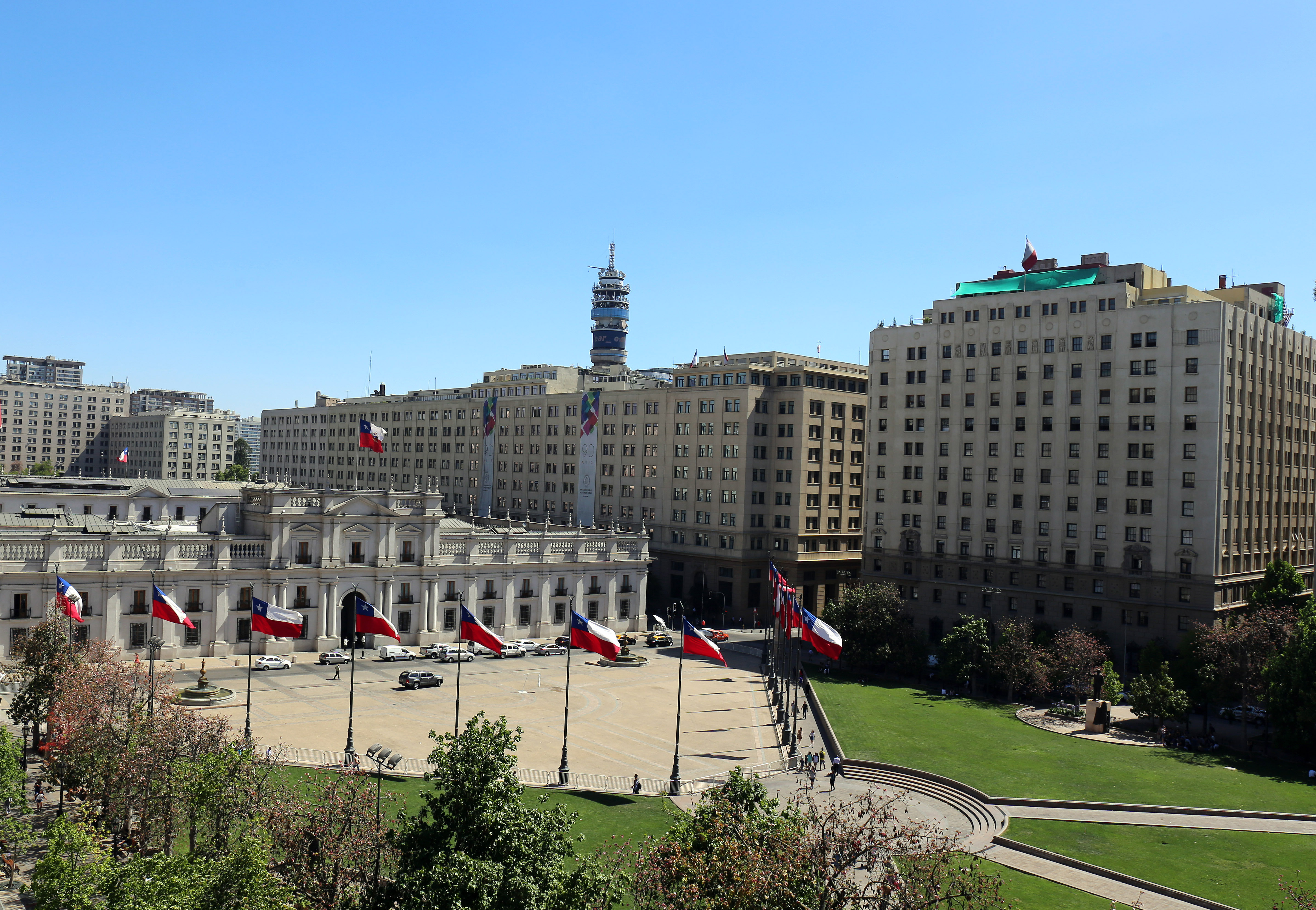 Alrededor de la Plaza de la Constitución se ubican el Palacio de la Moneda, los ministerios de Hacienda, Relaciones Externas y de Justicia.